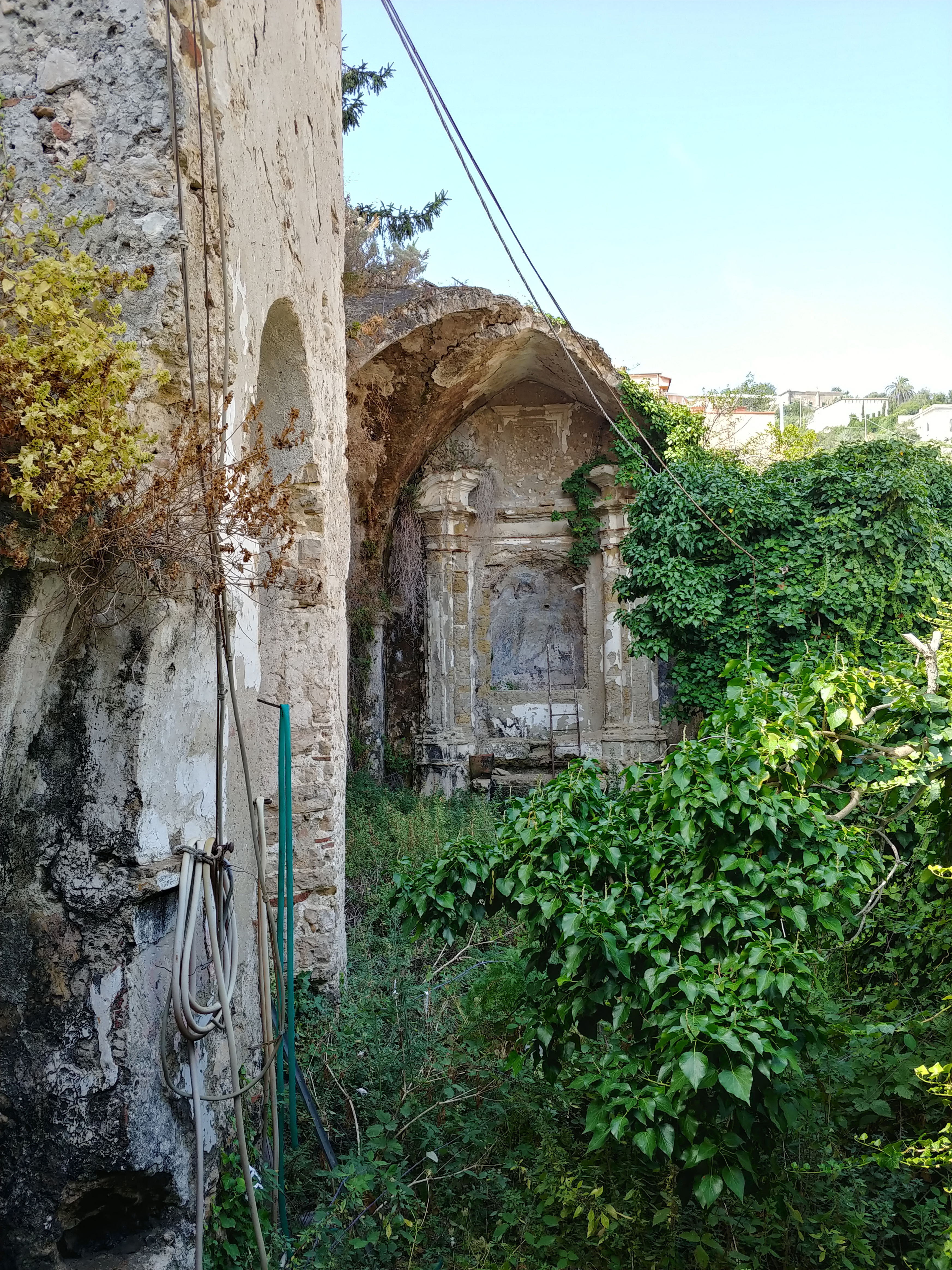 Interno.